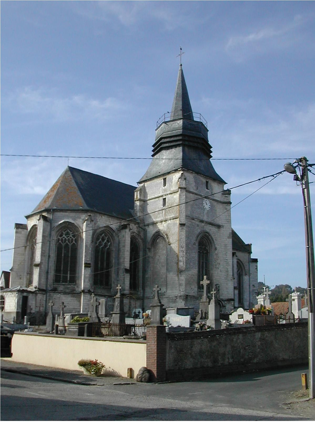 église Brimeux